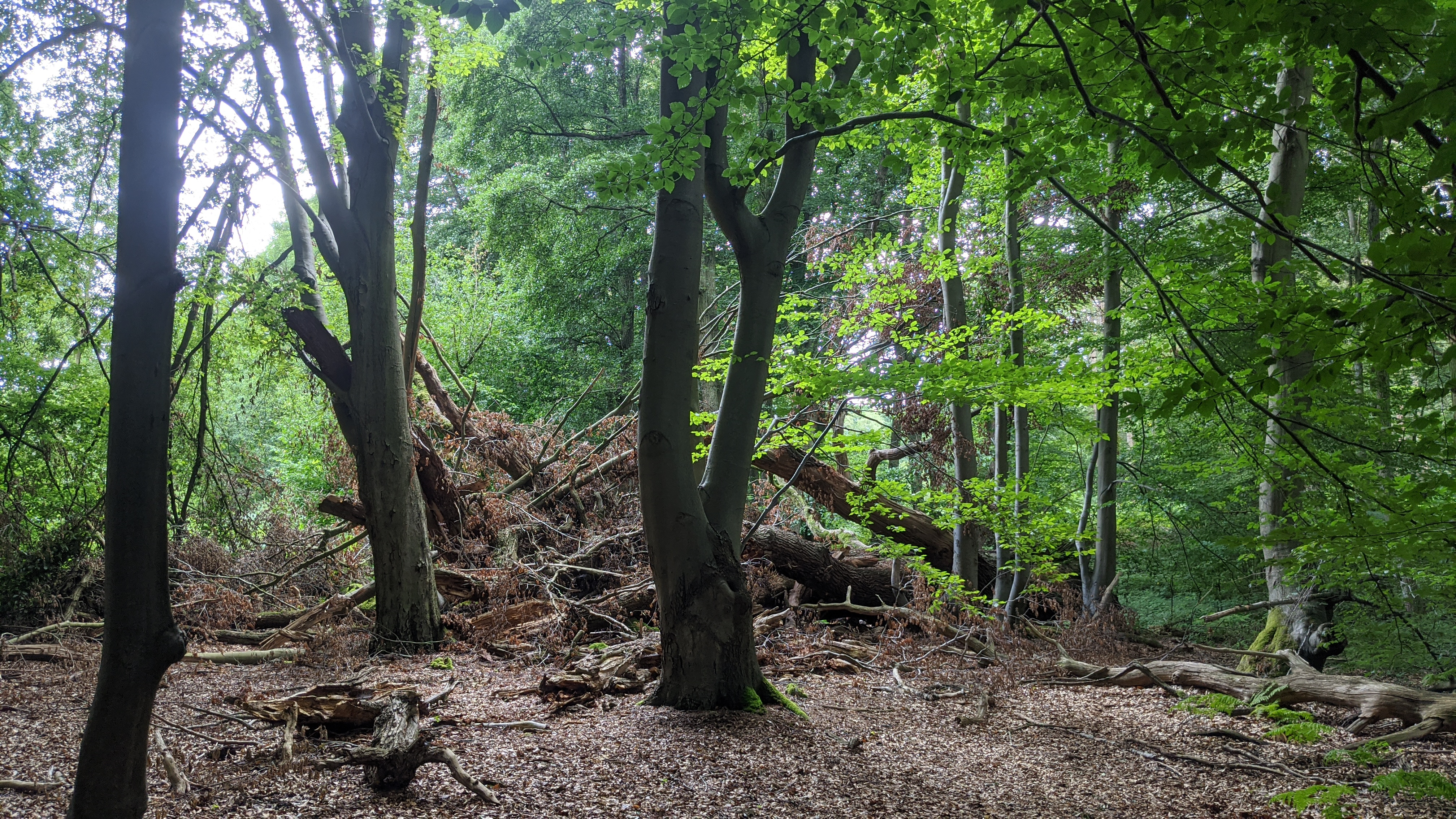 Umgestürzte Stieleiche am Herschel, Herongen Denkmalnummer ND 31 Die am Boden liegende ehemalige Baumkrone